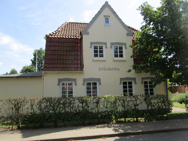 Den tidligere danske skole (Klitskolen) i Sankt Peter (Ulstrup).